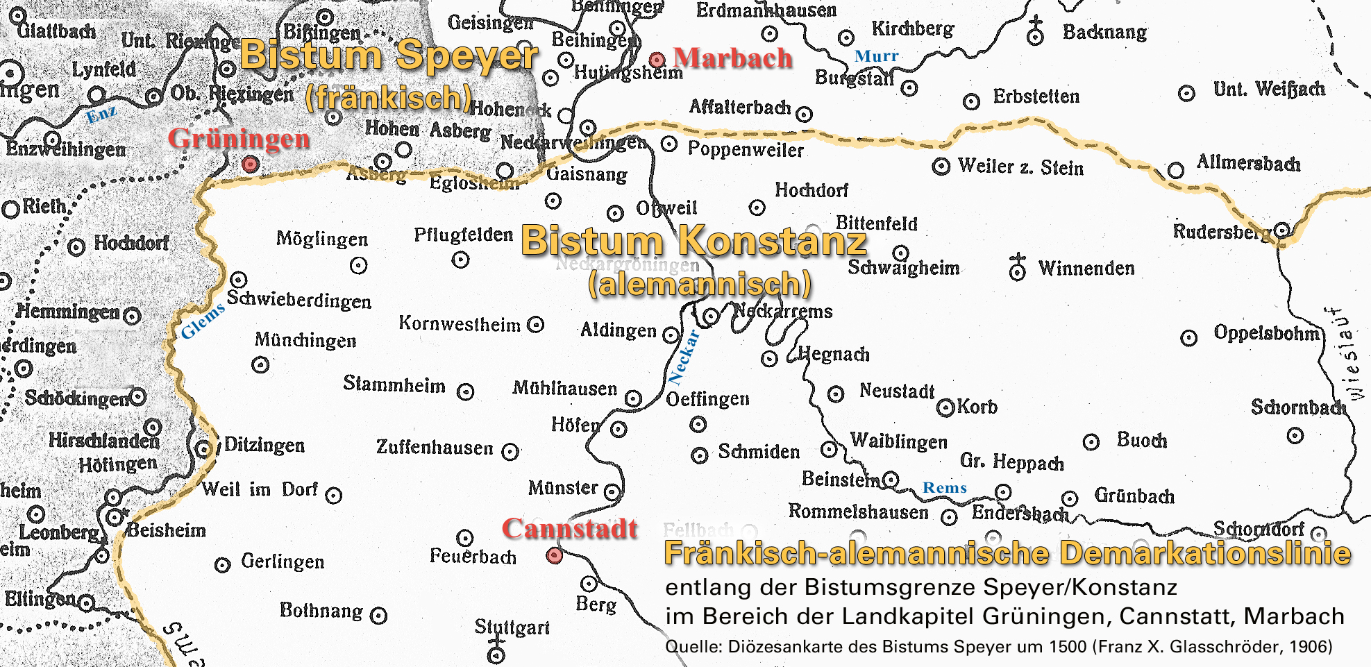 Bistumsgrenze Speyer-Konstanz im Bereich der Landkapitel von Grüningen, Cannstatt und Marbach (um 1500) Quelle: Diözesankarte des Bistums Speyer am Ende des Mittelalters von Franz X. Glasschröder (1906)